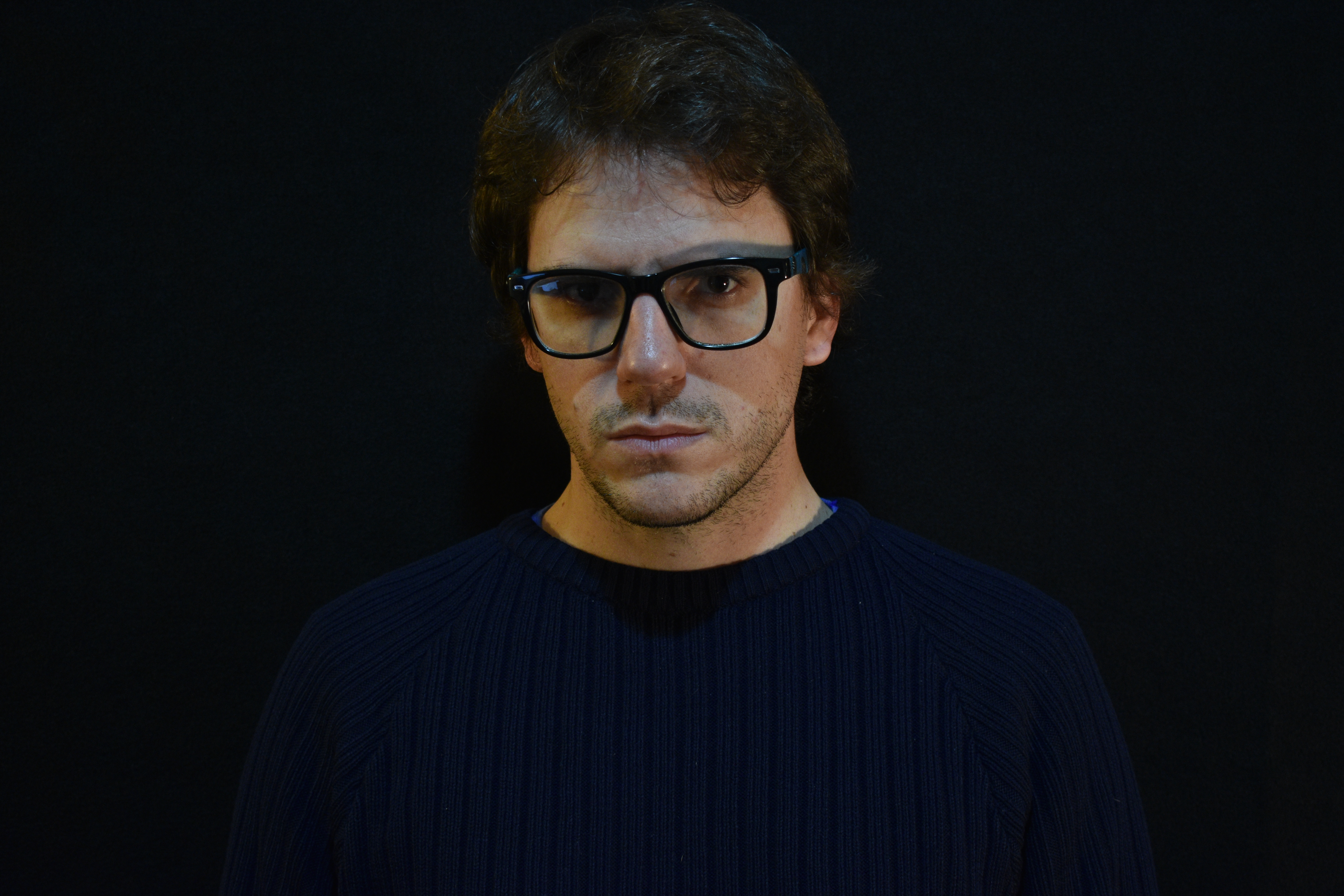 Lucas Berruezo